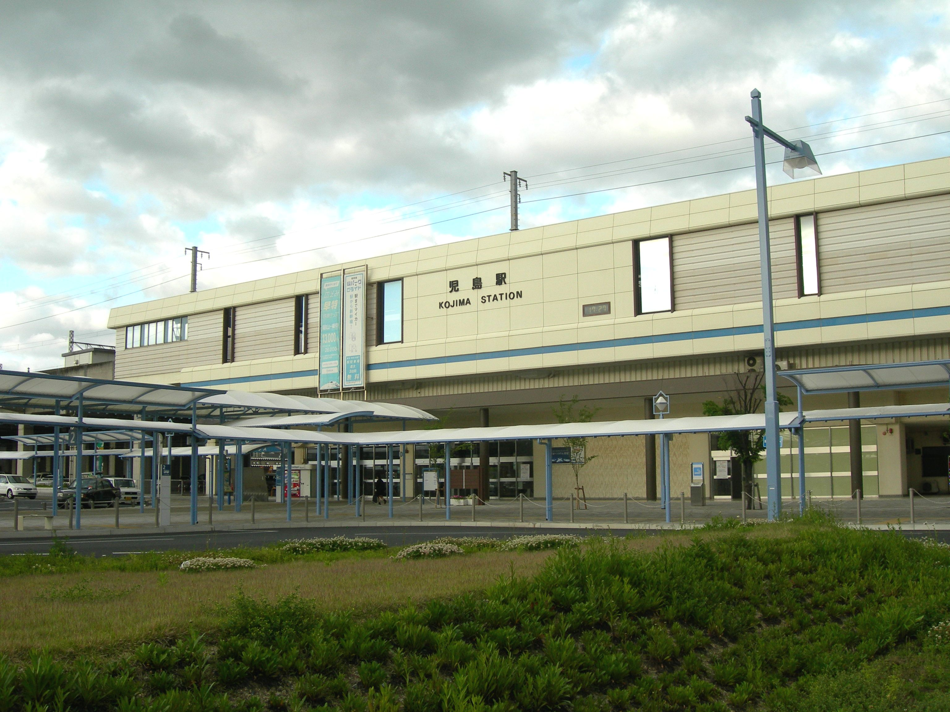 児島駅